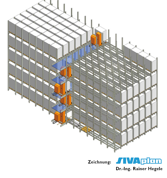 SAT-Mobil auf jeder Ebene